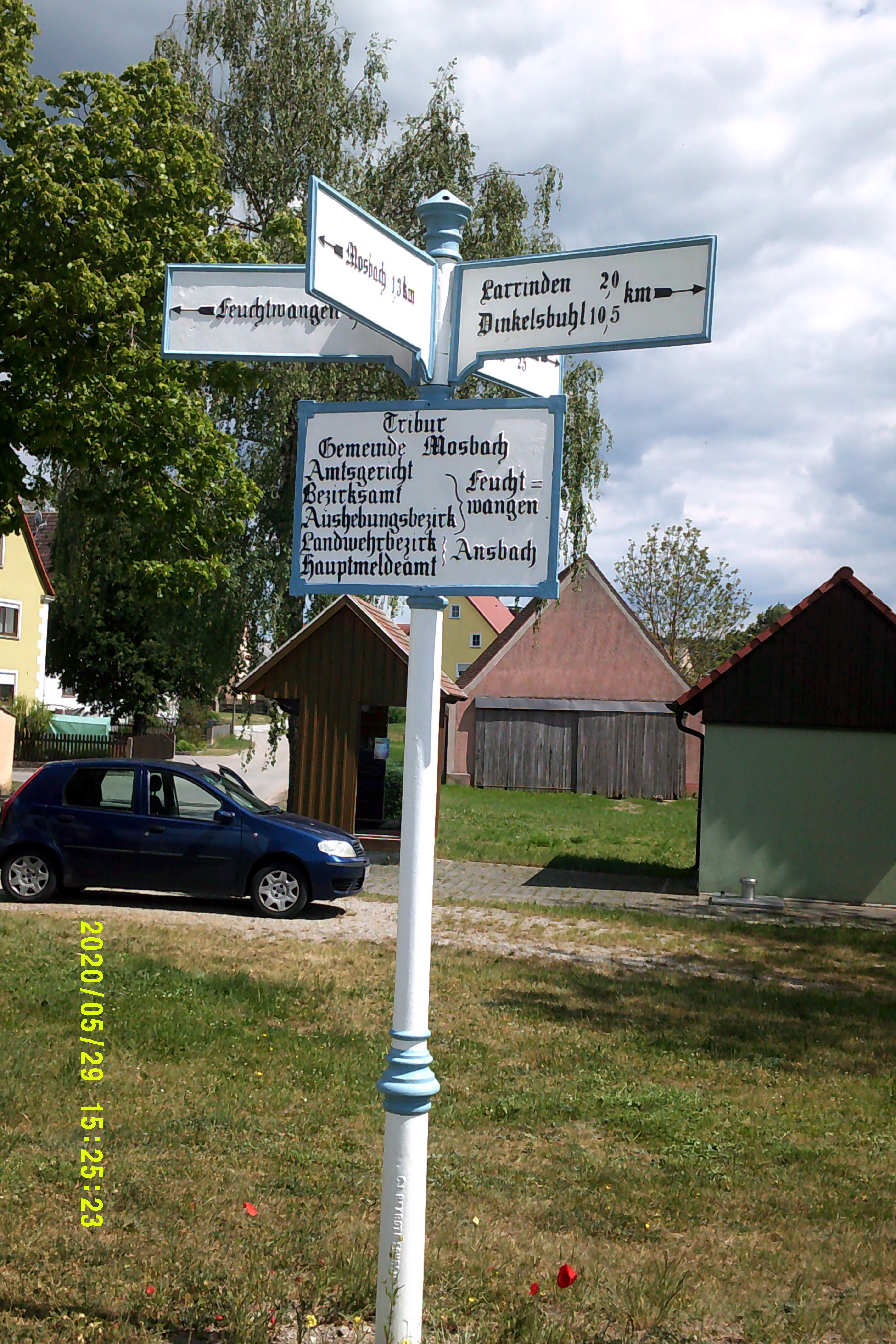 Ortsschild Tribur, Ortsteil Stadt Feuchtwangen